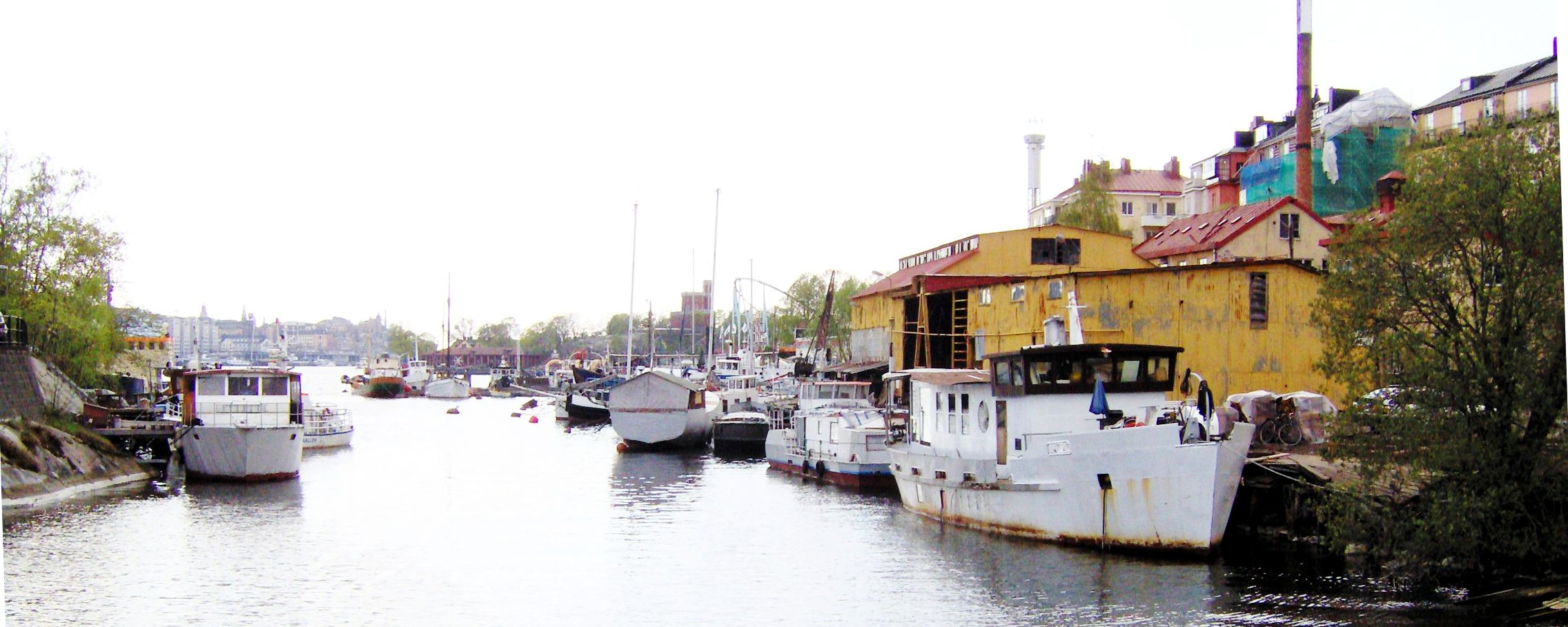 Beckholmssundet mellan Djurgårdstaden, Gröna Lund och Beckholmen i Stockholm. 2006. Beckholmssundet, a straight in Stockholm outside Gröna Lund.